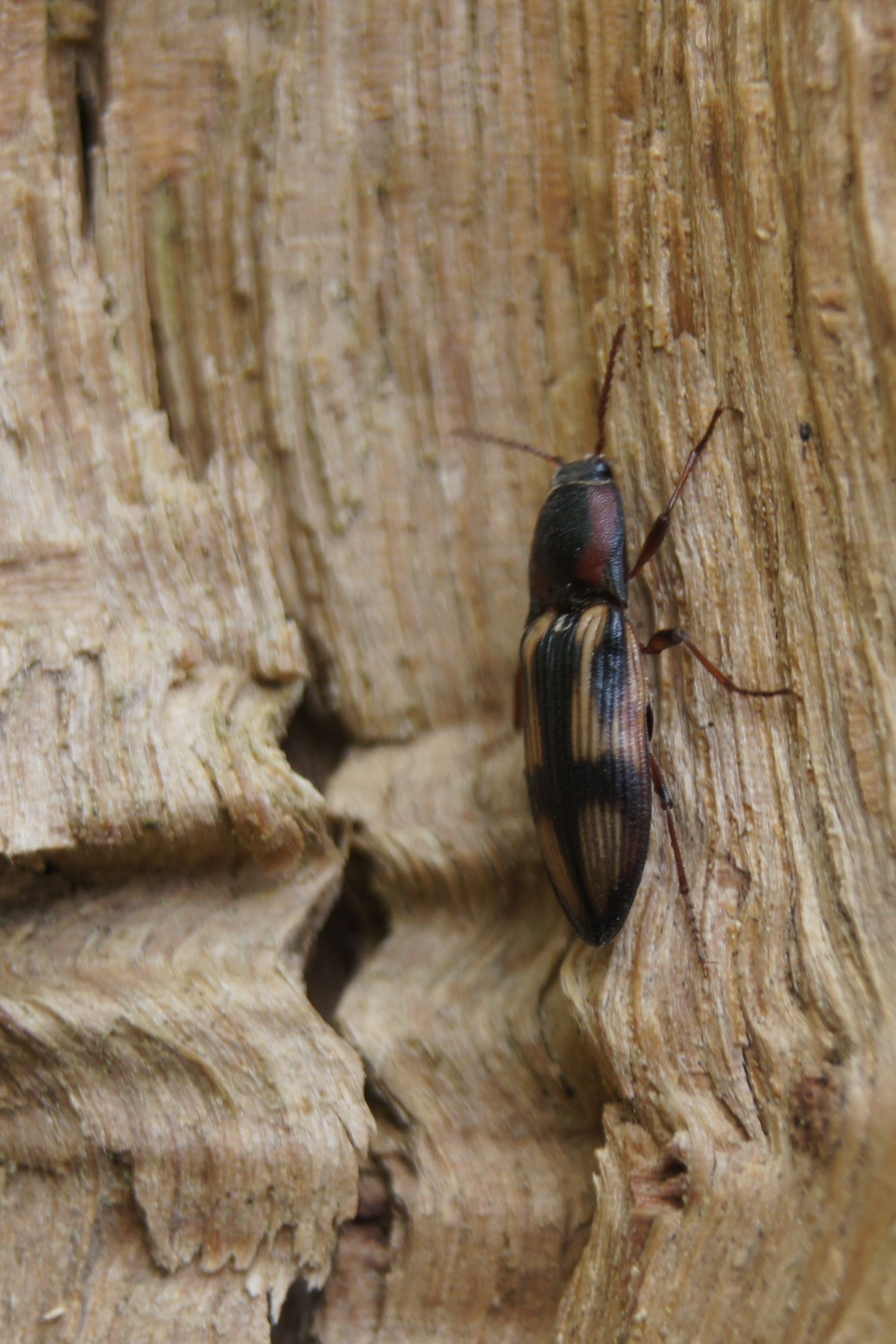 Kryžiuotasis rugiasprakšis (Selatosomus cruciatus) Punios šile